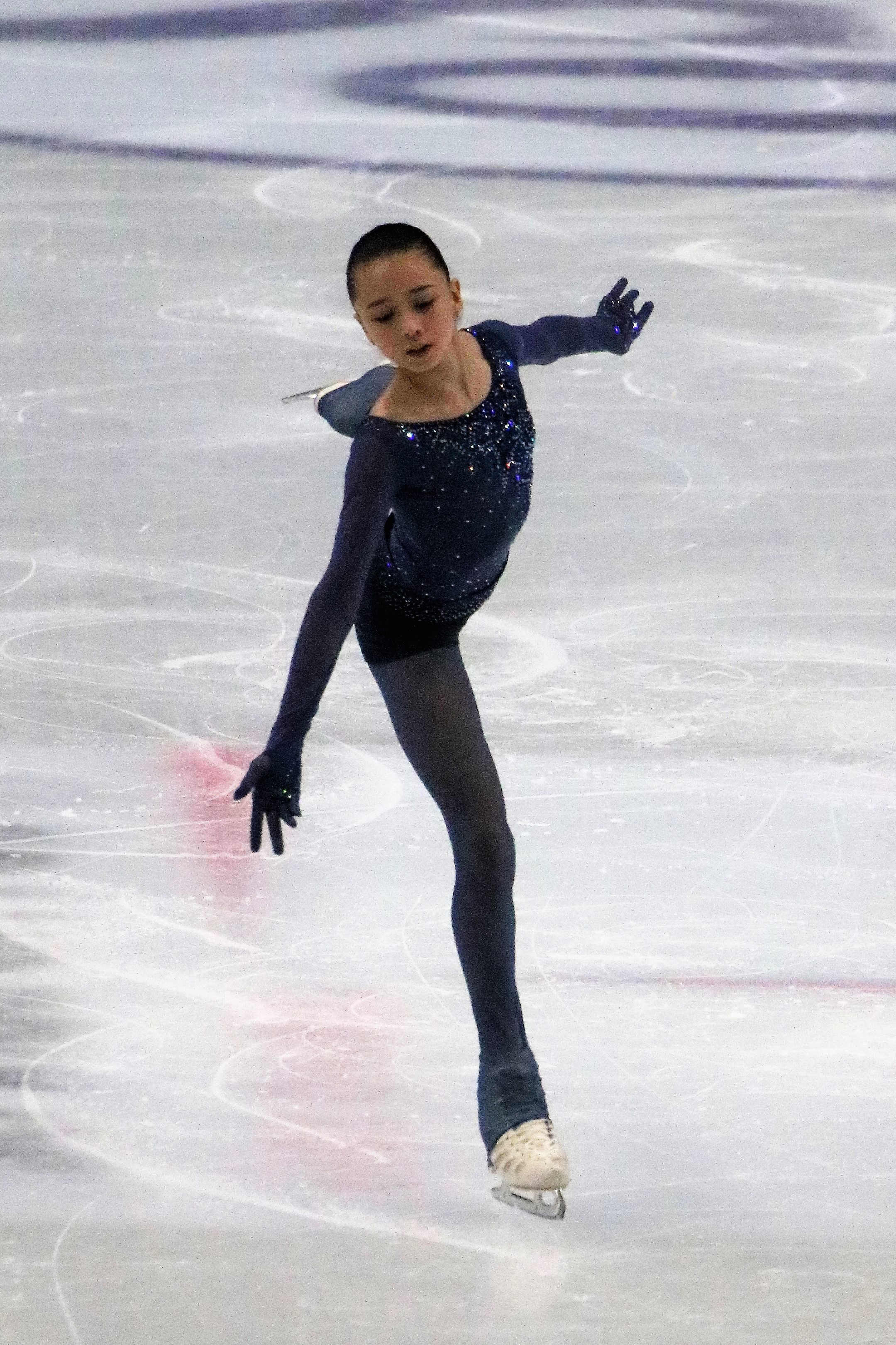 Камила Валиева (Россия) на финале юниорского Гран-при 2019-2020